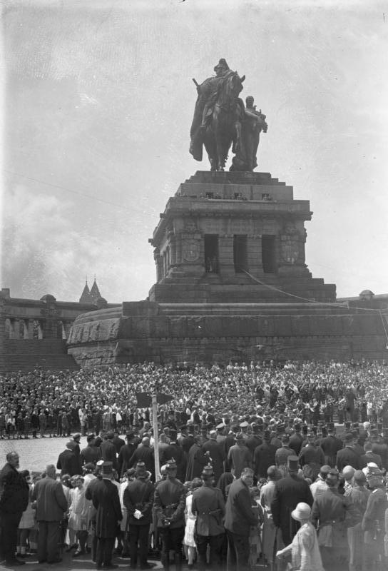 Der traurige Ausklang der Hindenburg-Reise in Koblenz a/Rh. Wenige Stunden vor der Tragödie. Tausende von Menschen am Fusse des Denkmals am Deutschen Eck während der Huldigung für den Reichspräsidenten.